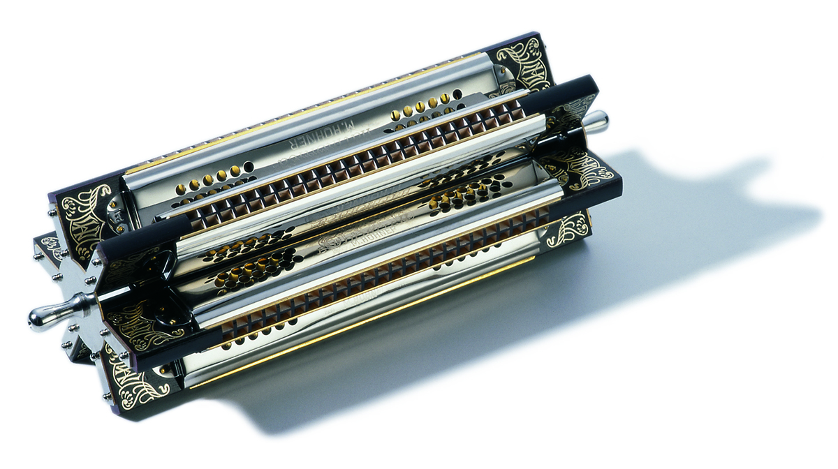 Hohner Tremolo Kreuzwender Mundharmonika mit 7 Tonarten